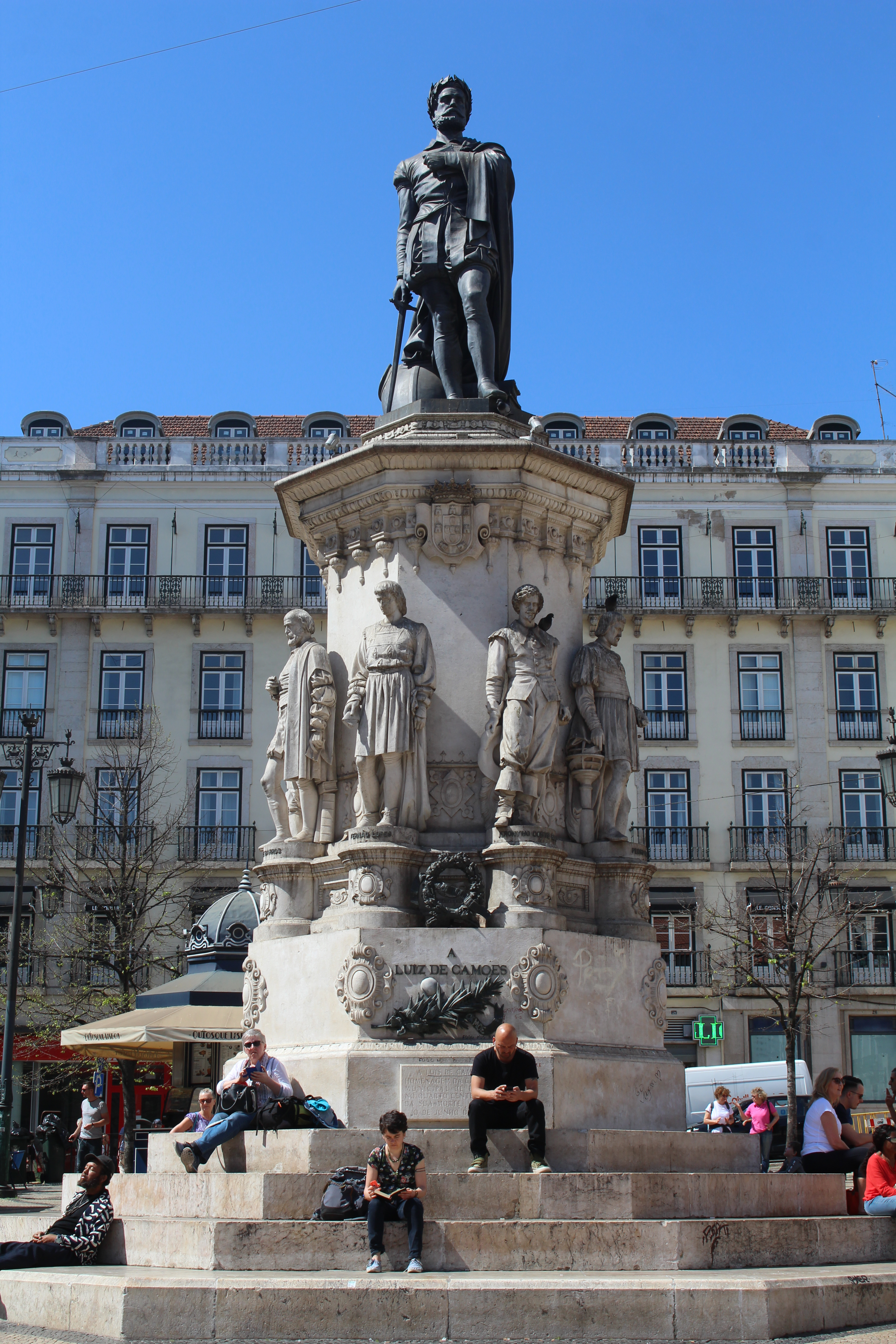 Monument à Luís Camões, Lisbonne.